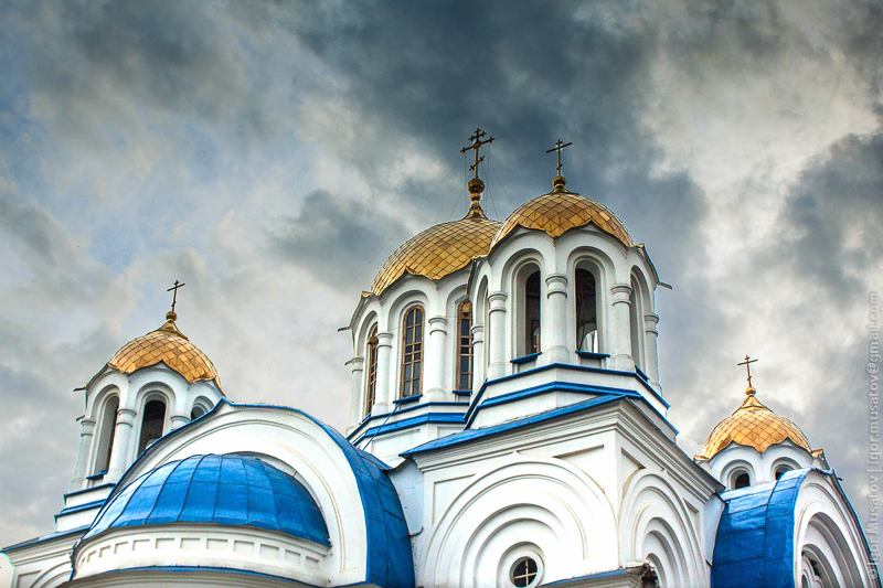 Никольский собор г. Прохладный